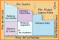 Pedanías